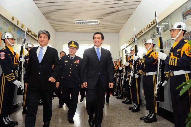 中華民國總統馬英九與內政部部長李鴻源赴內政部警政署大禮堂出席「101年第34屆警察節慶祝大會」，校閱中華民國警察儀隊。